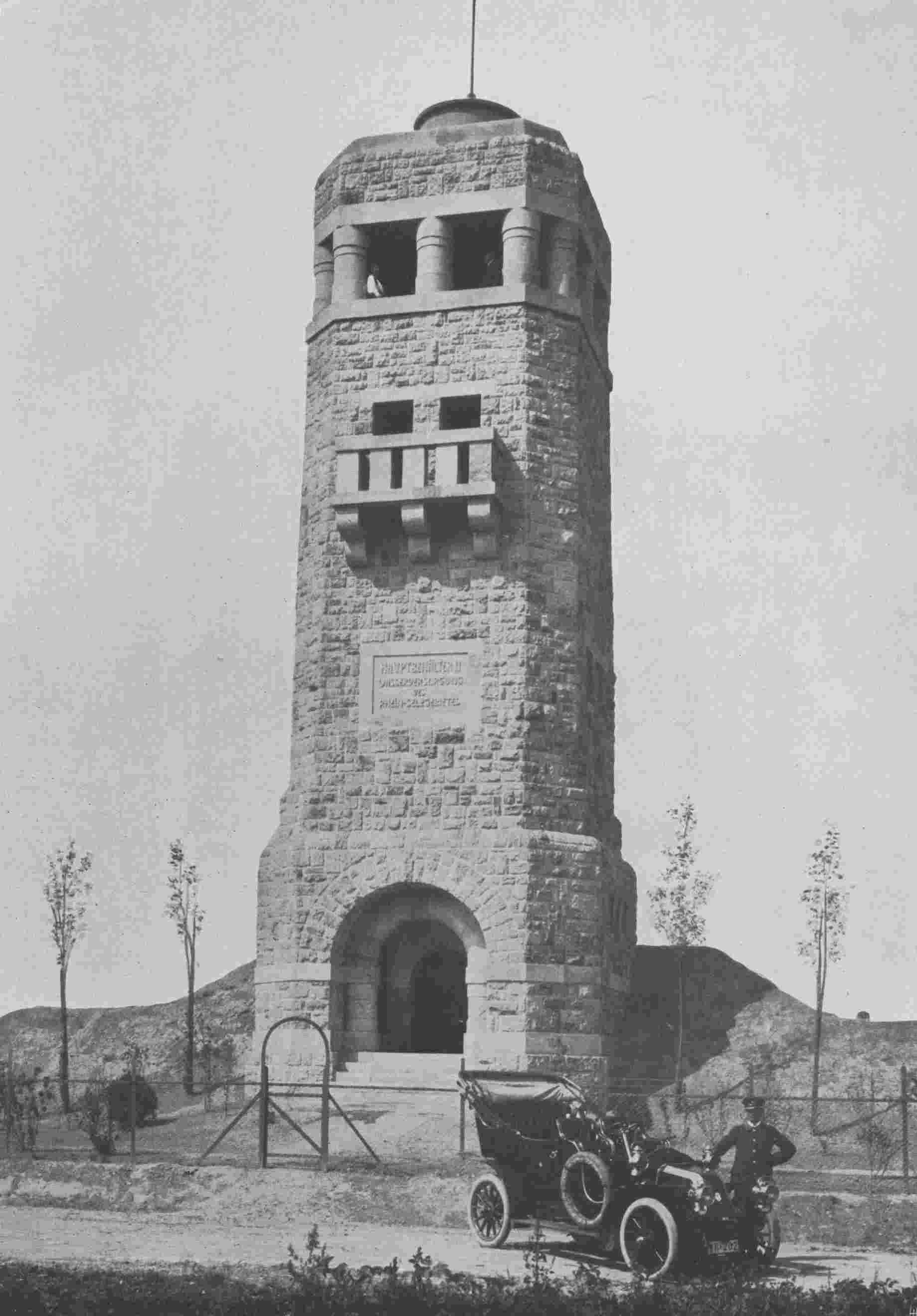 Bruno von Boehmer, Wintersheim